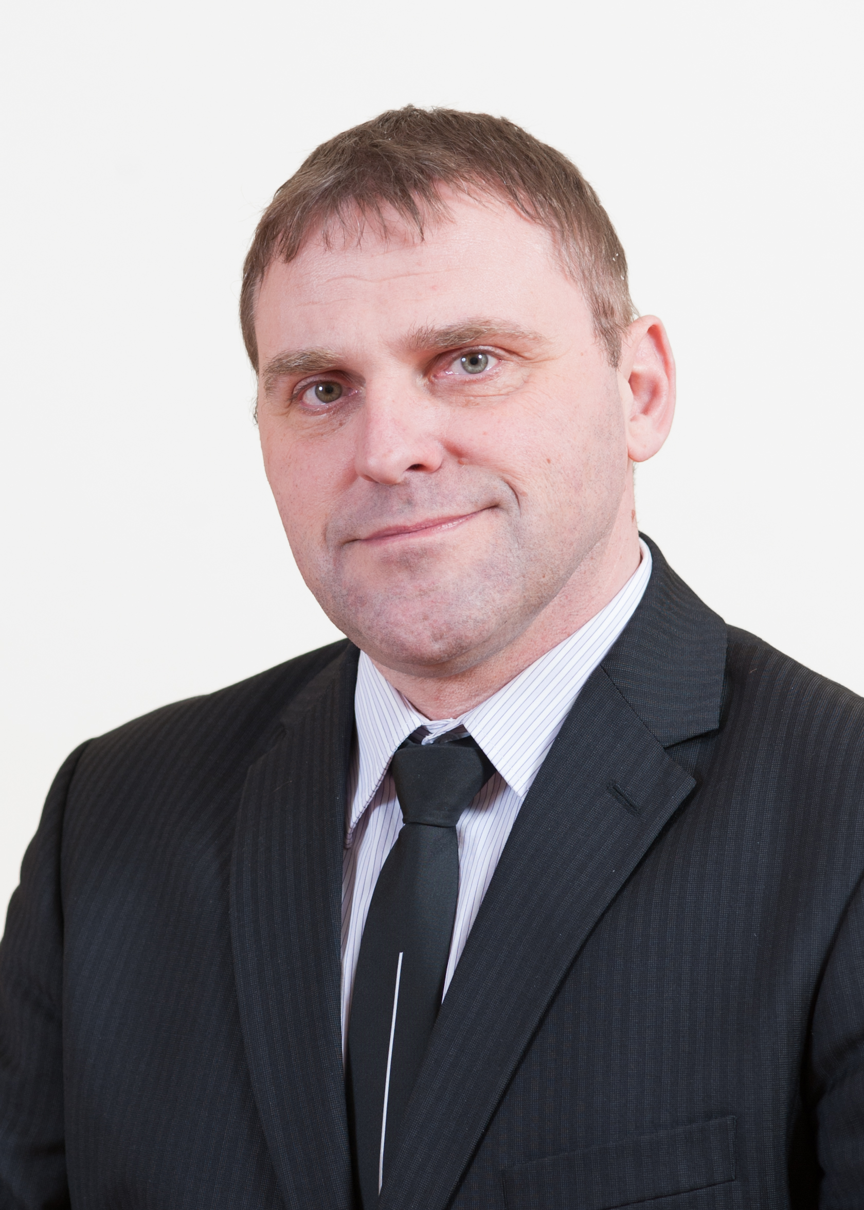 Madis Milling